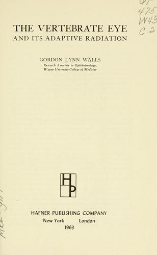 The vertebrate eye and its adaptive radiation